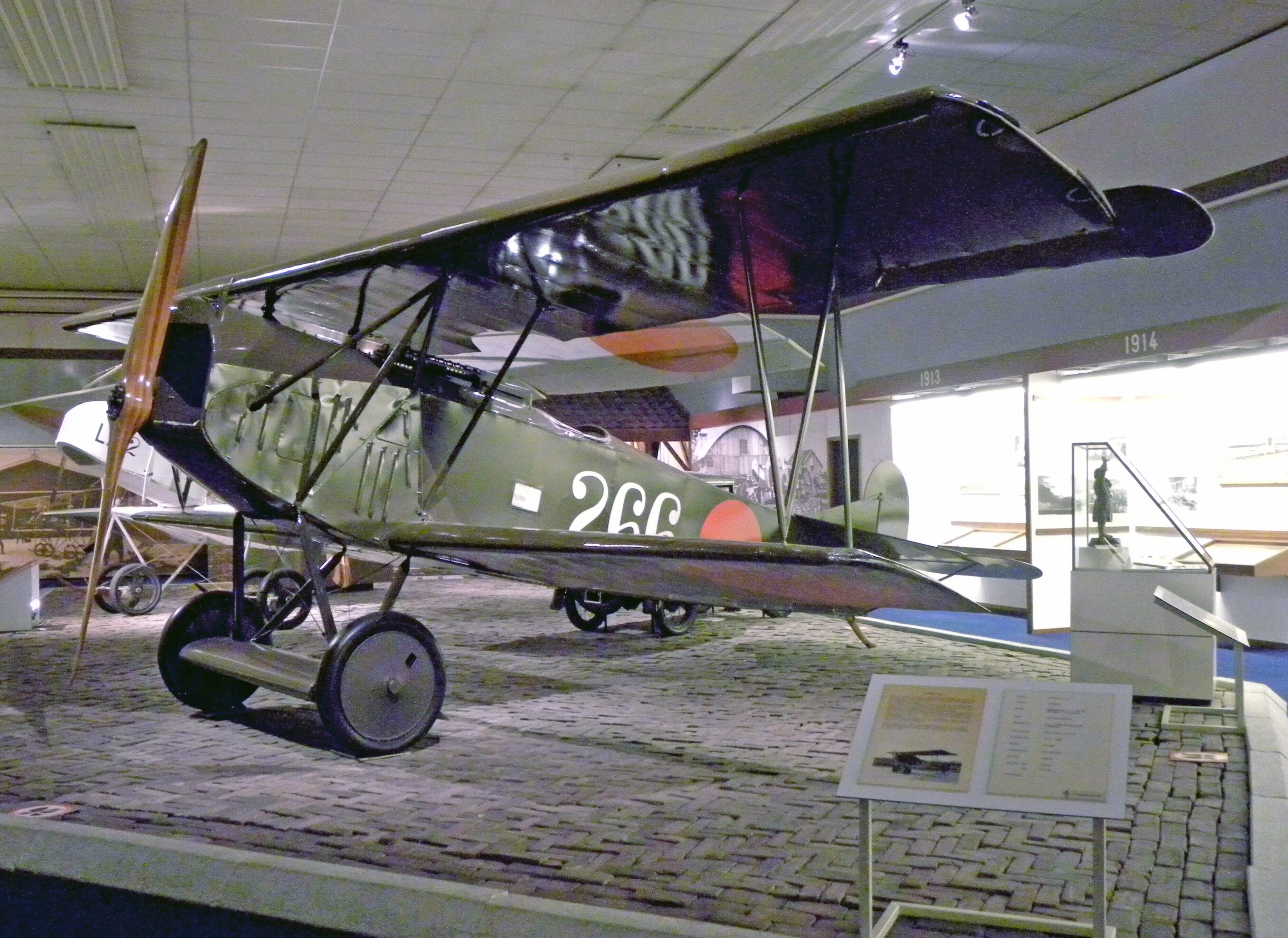 Fokker D-7